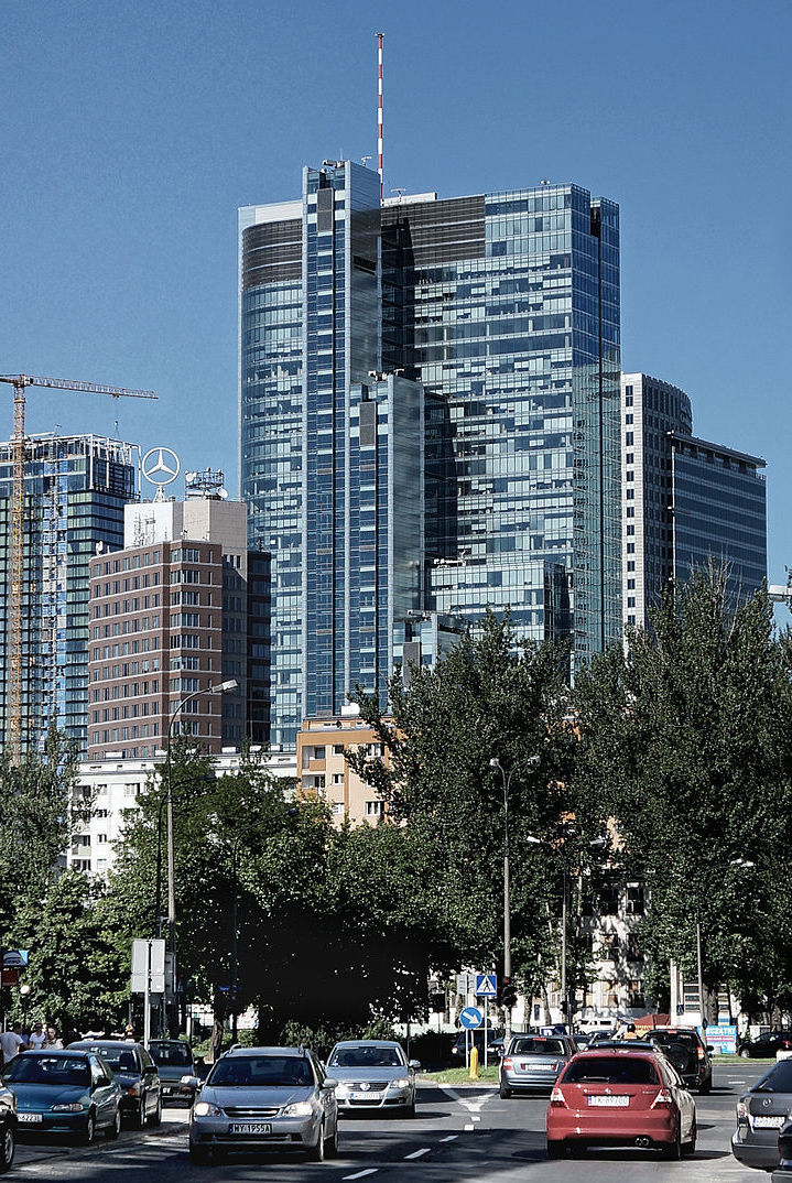 Widok na wieżowce w okolicy ronda ONZ: Cosmopolitan, Ilmet, Rondo1 i WFC